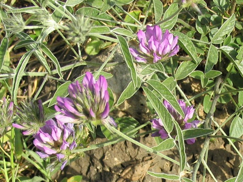 Flowers of Bituminaria bituminosa (syn. Psoralea bituminosa).